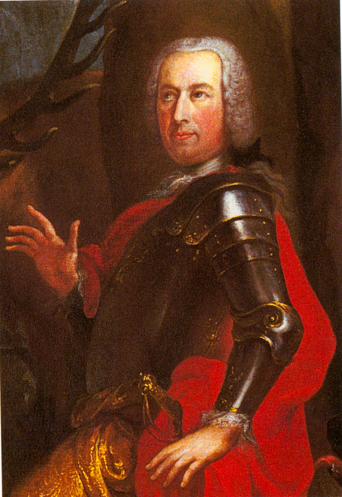 Ernst Graf von Montfort (1700 – 1758) Als Heiliger Eustachius